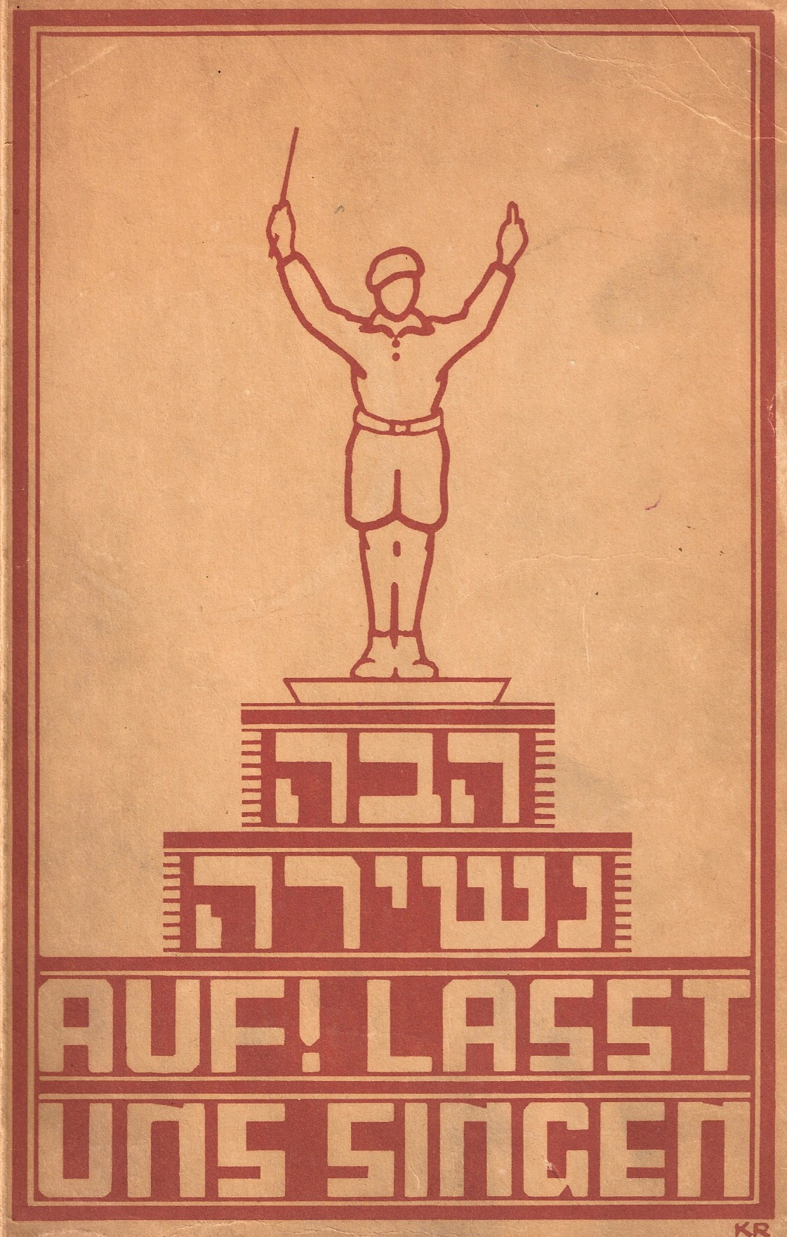 Hawa naschira - Auf! Lasst und singen, Titelblatt, Leipzig (Benjamin) 1935